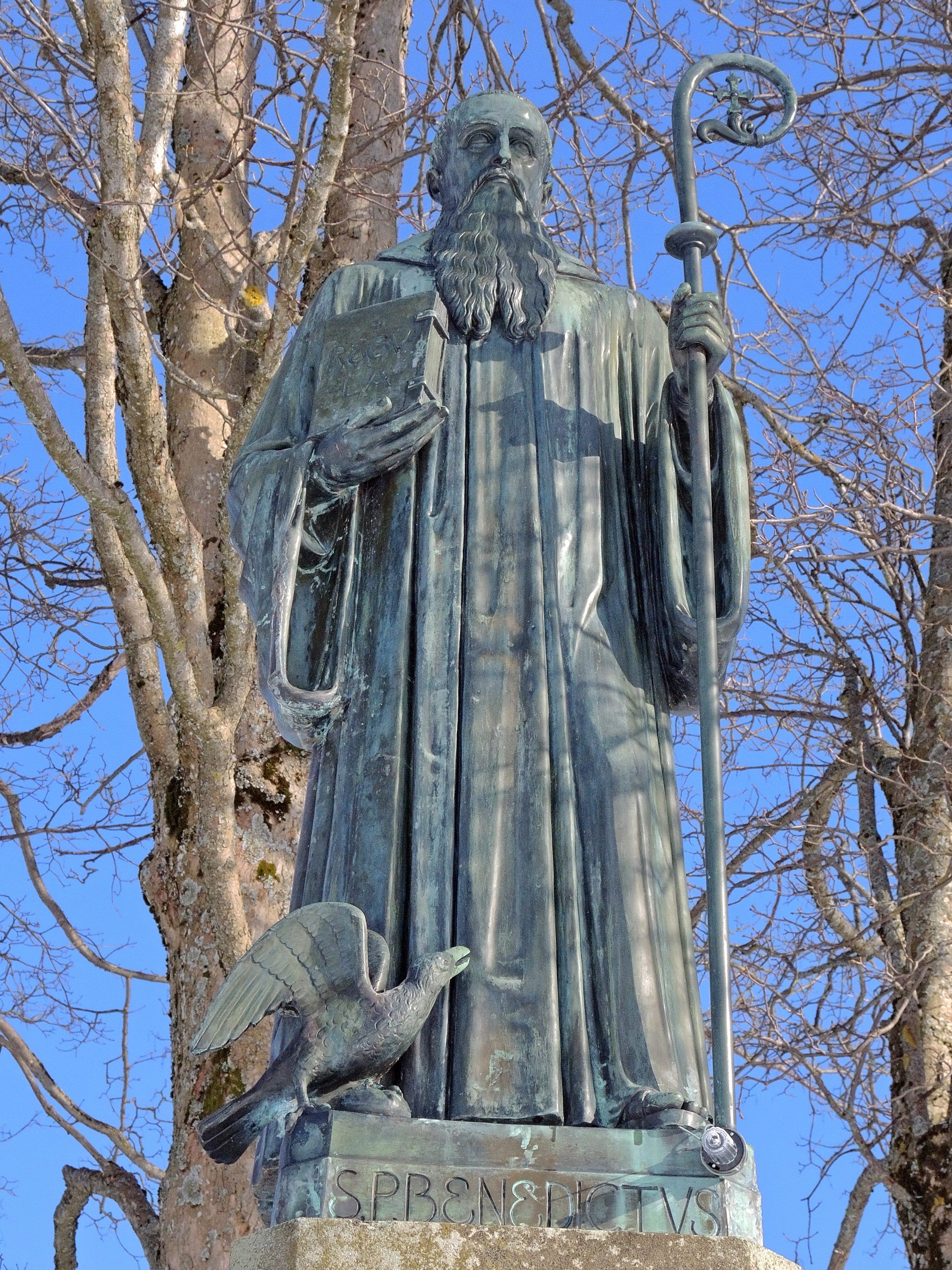 St. Benedict in Einsiedeln in (Switzerland